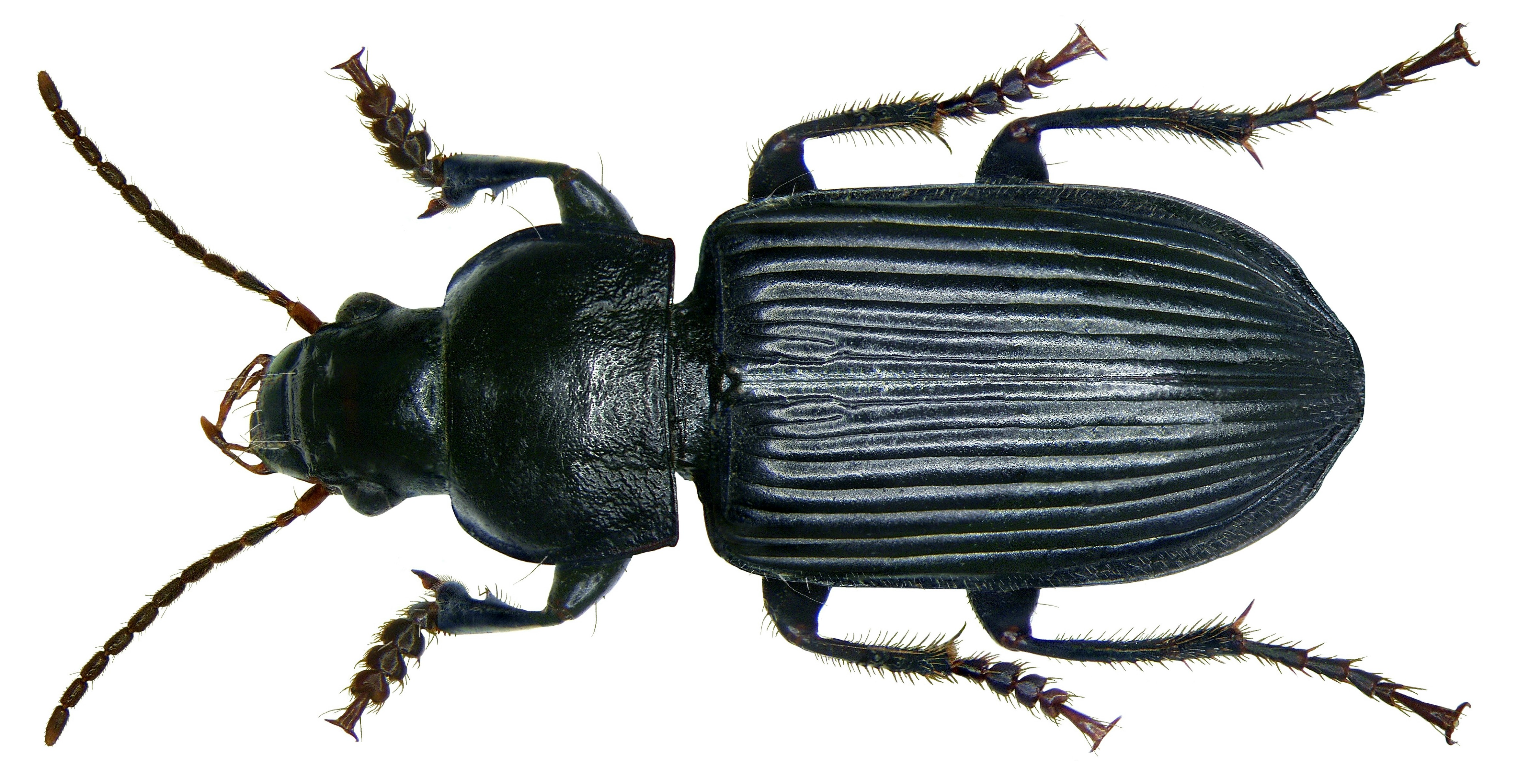 Familie: Carabidae Größe: 9,2-12,8 mm Verbreitung: westpalaearktisch bis Mittelasien, eingeschleppt in Nordamerika Ökologie: eurytop in feuchten Biotopen Fundort: Italia, Südtirol, Brixen leg.det. U.Schmidt, 1973 Foto: U.Schmidt, 2008